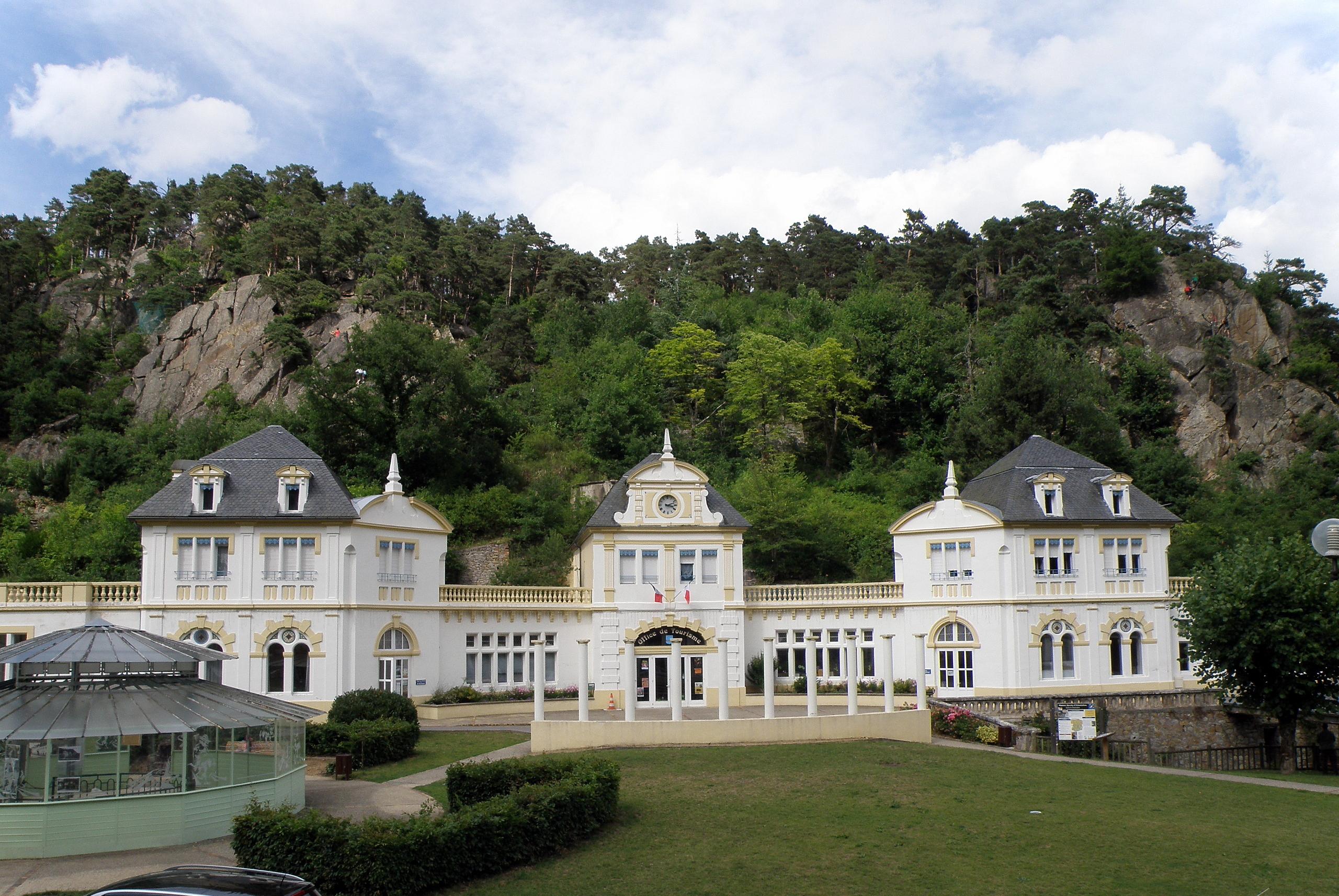 Saint-Nectaire, comm. du Puy-de-Dôme (France, région Auvergne). Saint-Nectaire-le-Bas. Établissement thermal (hébergeant aujourd’hui l’office de tourisme de Saint-Nectaire).